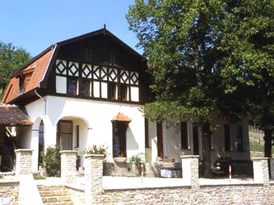 Haus Lochfeld (Zentrum für Naturschutz)